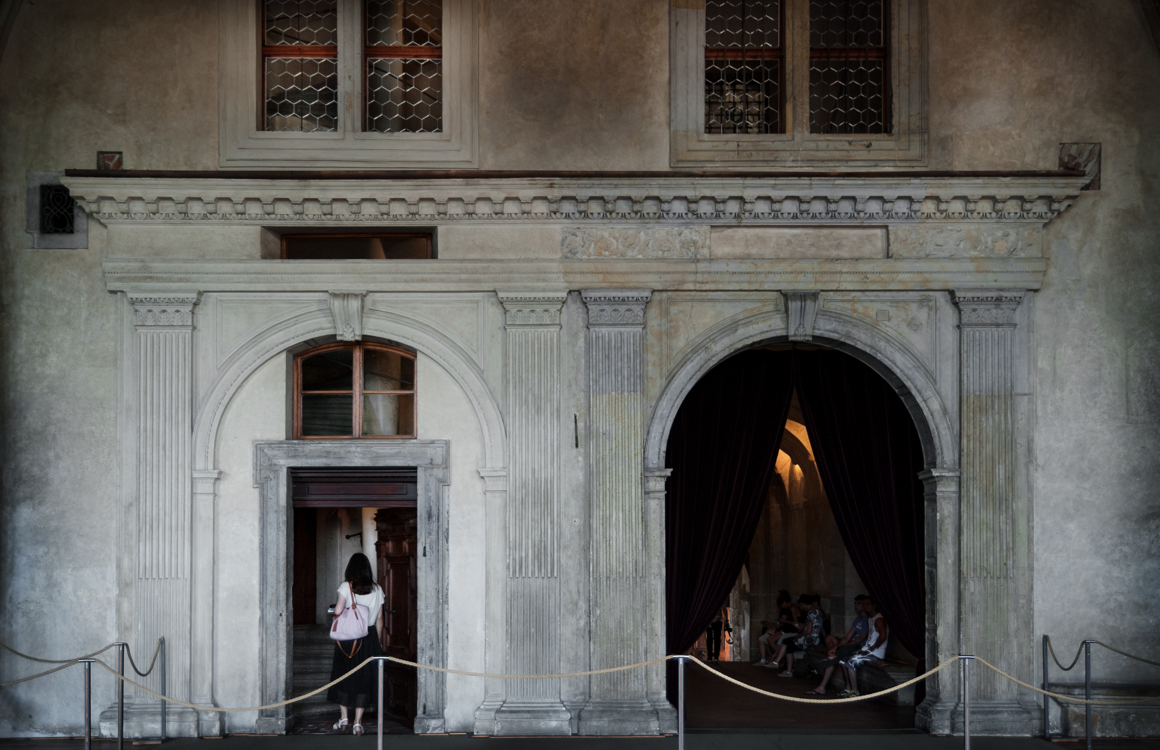 Pražský hrad, Hradčany.